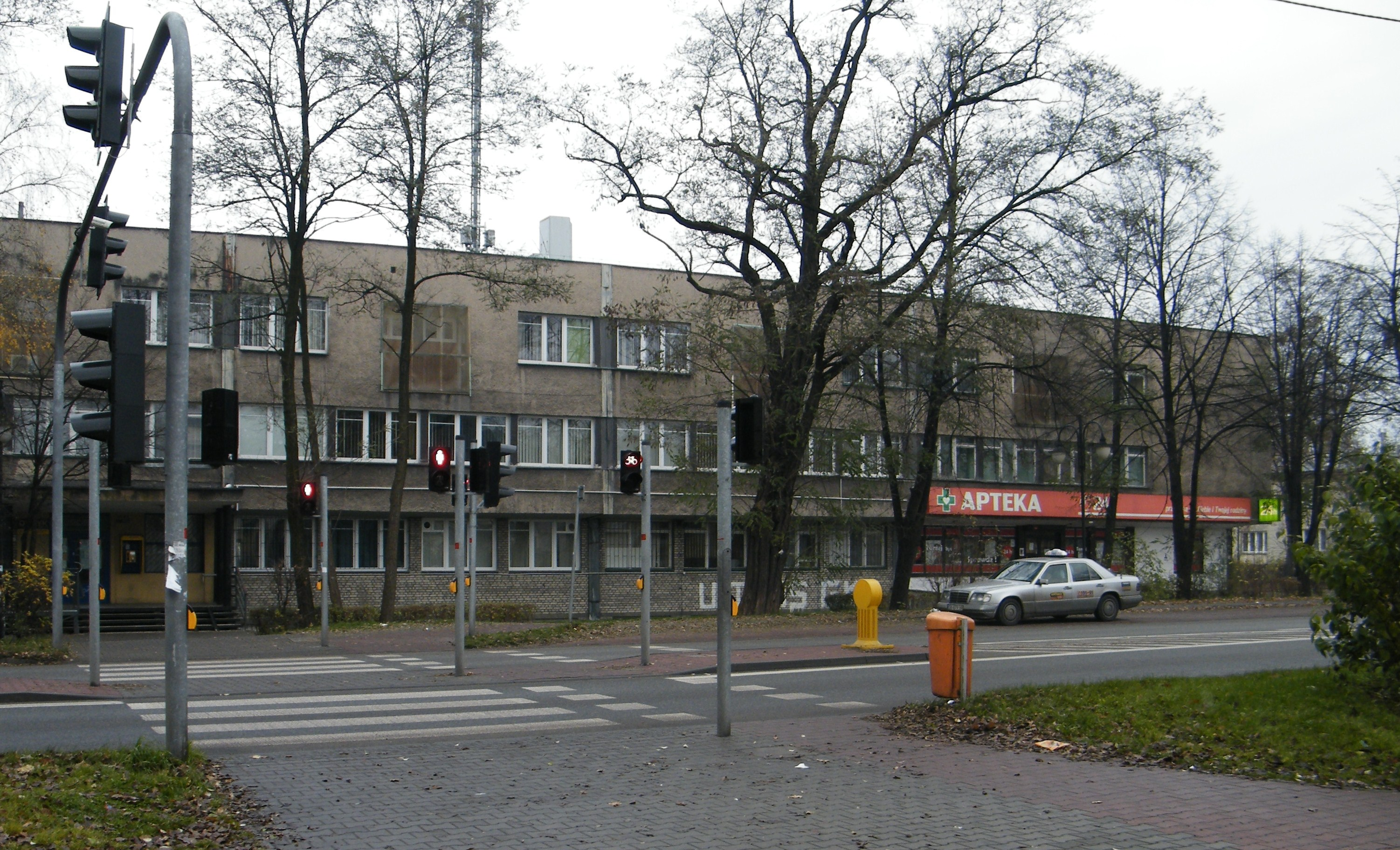 Przychodnia "GWAREK" i Apteka.